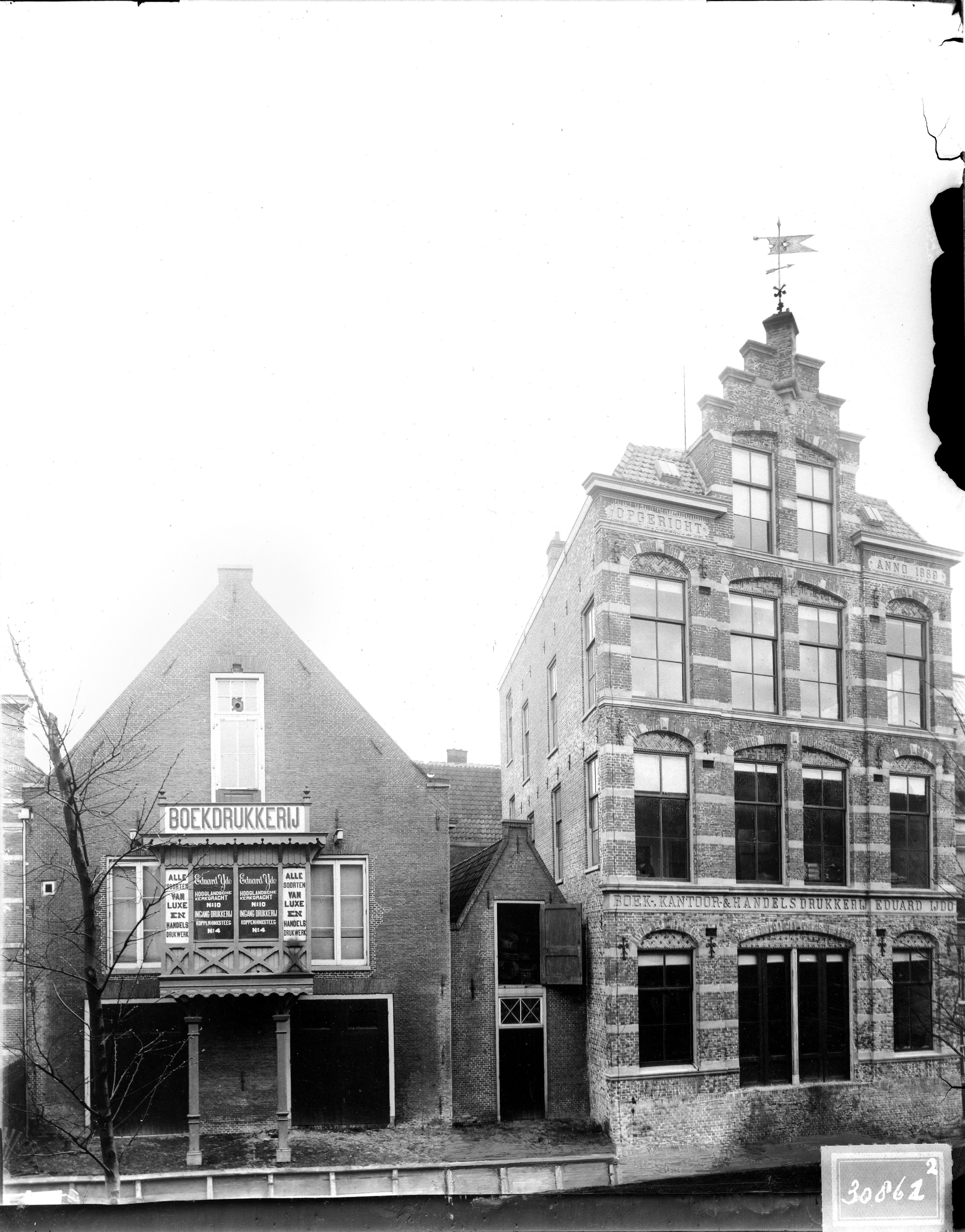 Achtergevels van drukkerij Eduard IJdo aan de Hooglandsekerkgracht nrs 4 -4a en de Koppenhinksteeg nrs 2-4, gezien vanaf de Oude Rijn. Tekst: opgericht 1888 / Boek-, Kantoor- en Handelsdrukkerij Eduard IJdo.Tekst: Boekdrukkerij / Eduard IJdo / Hooglandschekerkgracht no 10 / ingang drukkerij Koppenhinksteeg no 4.